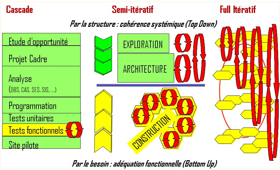 L'irératif se trouve dans tous les cycles mais de manières différentes